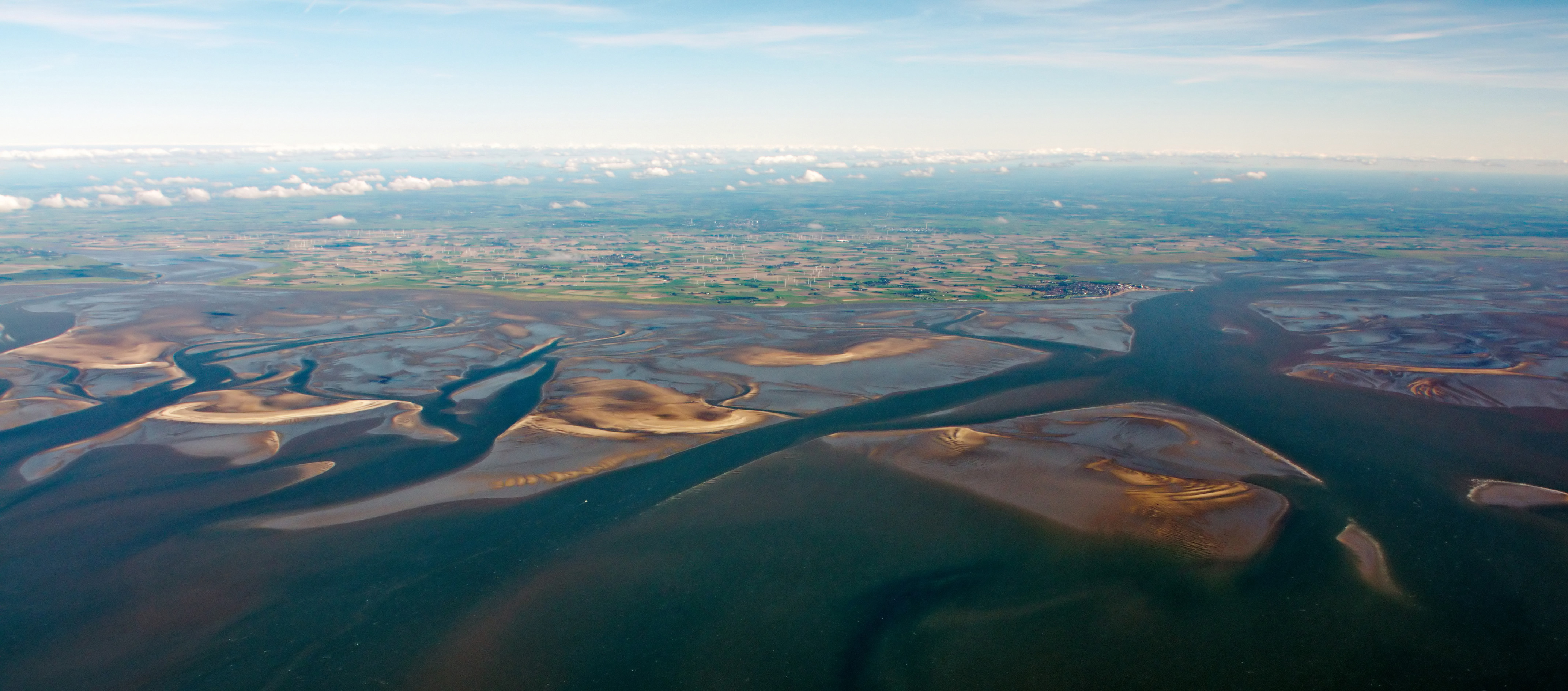 Fotoflug über das nordfriesische Wattenmeer - Norderdithmarschen (von SW), links Eidersperrwerk, rechts Büsum, ganz rechts Meldorfer Bucht